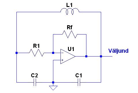 Joonis 3. Colpittsi ostsillaator kasutades operatsioonvõimendit.